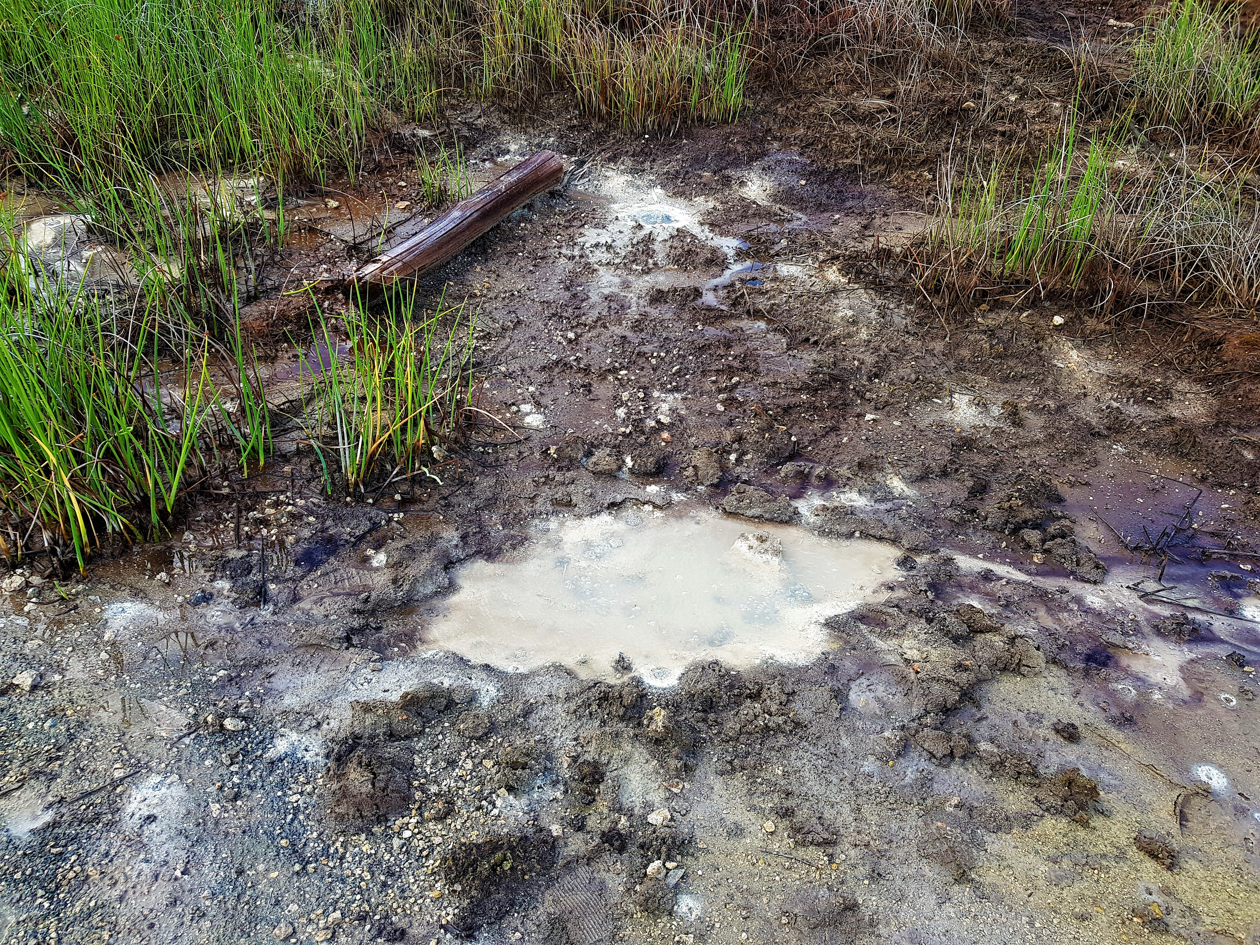 Pozza d'acqua che sgorga.